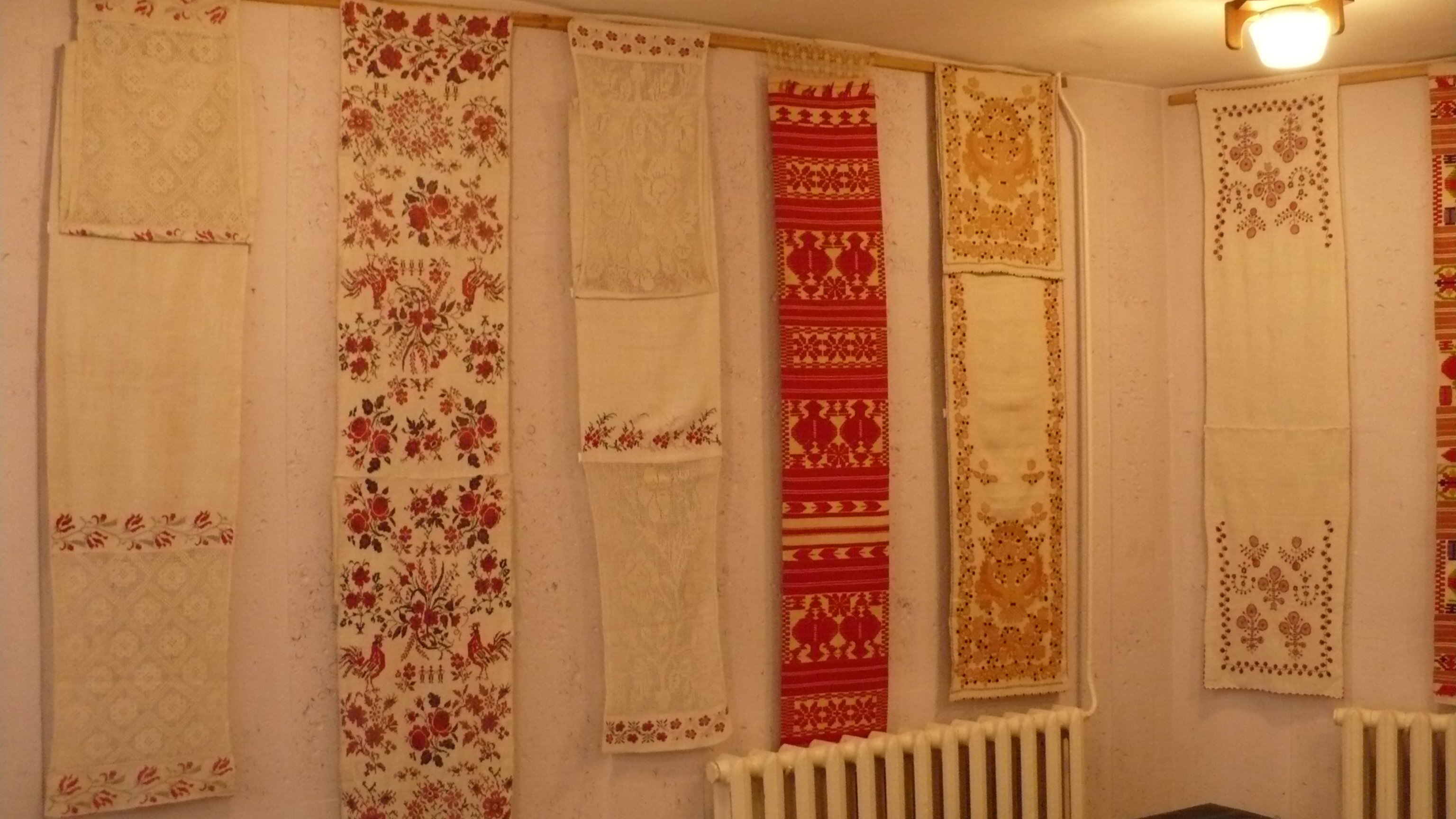 Миргородський Краєзнавчий музей (усередині 9). Внутрішній вигляд Миргородського Краєзнавчого музею